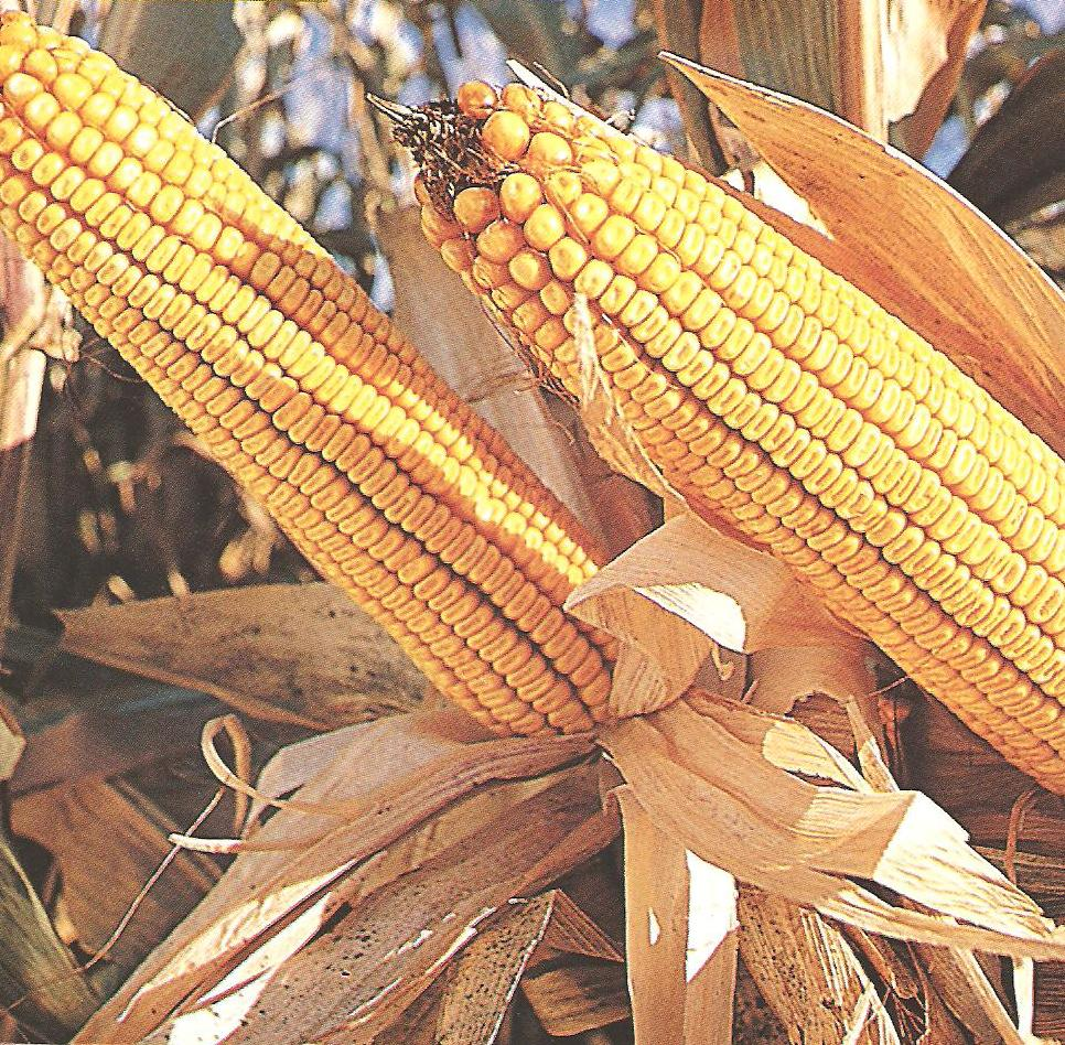 Maiz.